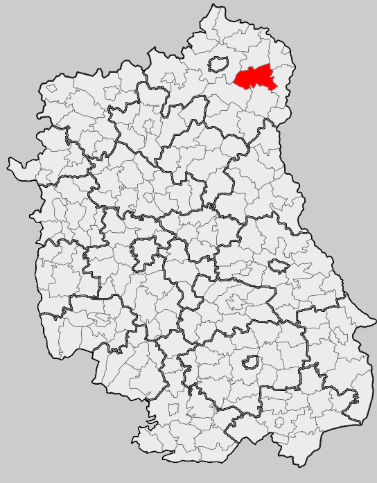 Map of gmina Piszczac, Biała Podlaska county, Lublin voivodship Mapa gminy Piszczac, powiat bialski, województwo lubelskie